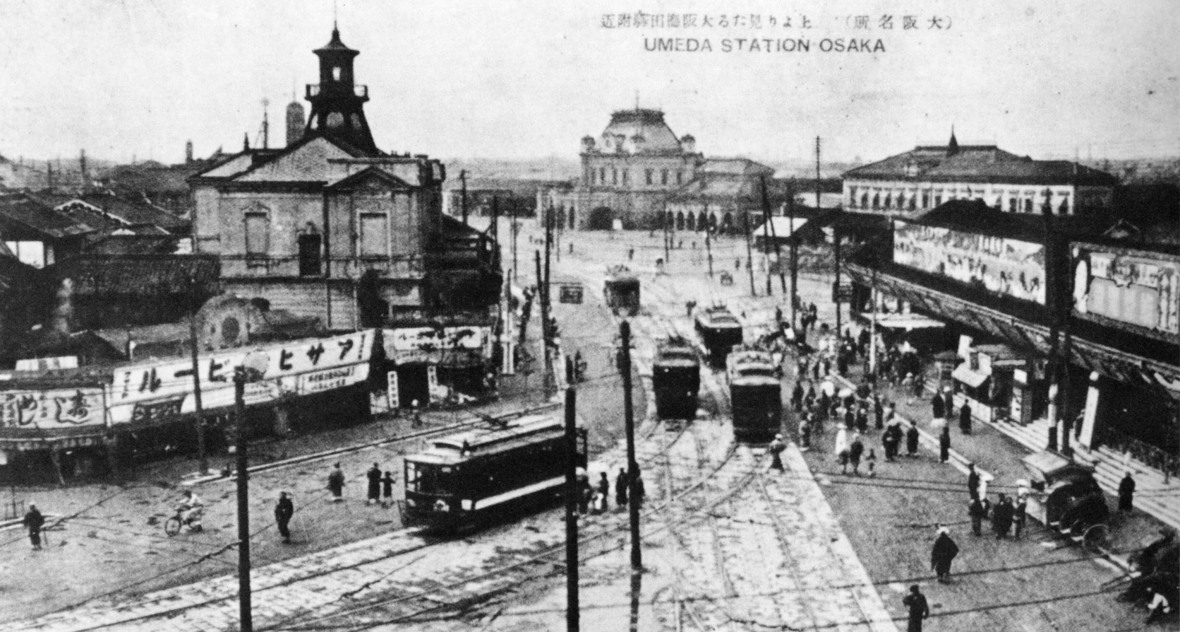 東、現在の阪急百貨店の位置から見た2代目大阪駅。大阪市電が走っている。右手前は阪急梅田駅。大阪市電が大阪駅前を走り始めた1908年(明治41年)8月から1926年(大正15年)に阪急梅田駅が高架化されるまでの間の撮影と推測される。